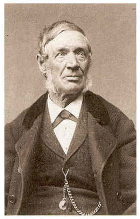 Gottfried Claes Carl Hagenbeck (1810-1887), Hamburger Fischhändler, Tierschausteller und Begründer eines Tierhandels. Vater von Carl Hagenbeck